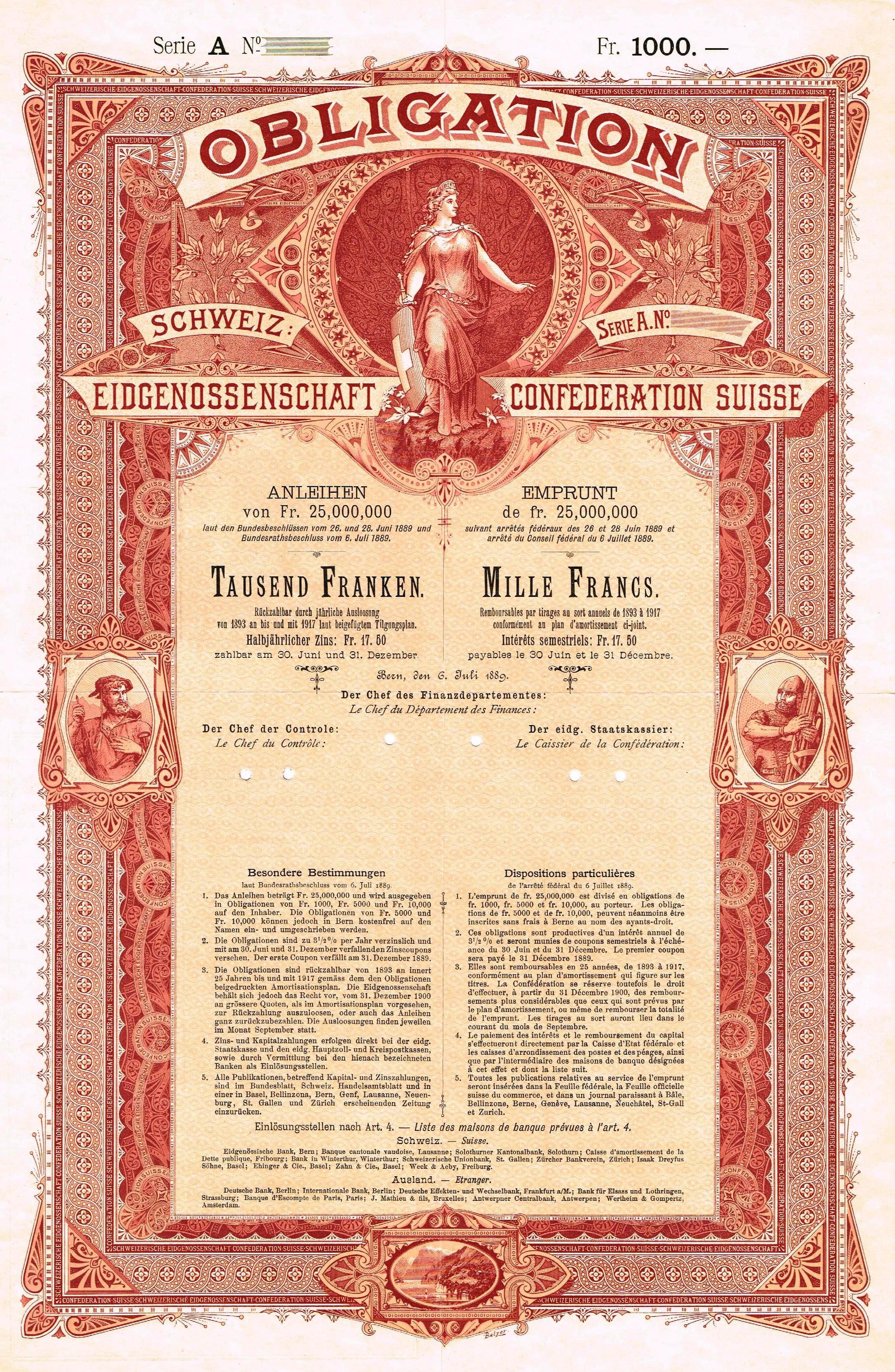 Schweizerische Staatsanleihe: 3.5% Obligation über 1000 Franken vom 6. Juli 1889